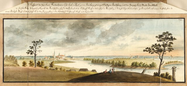 Scan from Johann Christoph Brotze's book Sammlung verschiedner Liefländischer Monumente. Prospect des der Frau Kammerherrrin Elis. Soph. von Korf geb. von Budberg gehörigen Städtgens Kreutzburg, und der Herzog. Kurl. Stadt Jacobstadt 1792 [die Ansicht].